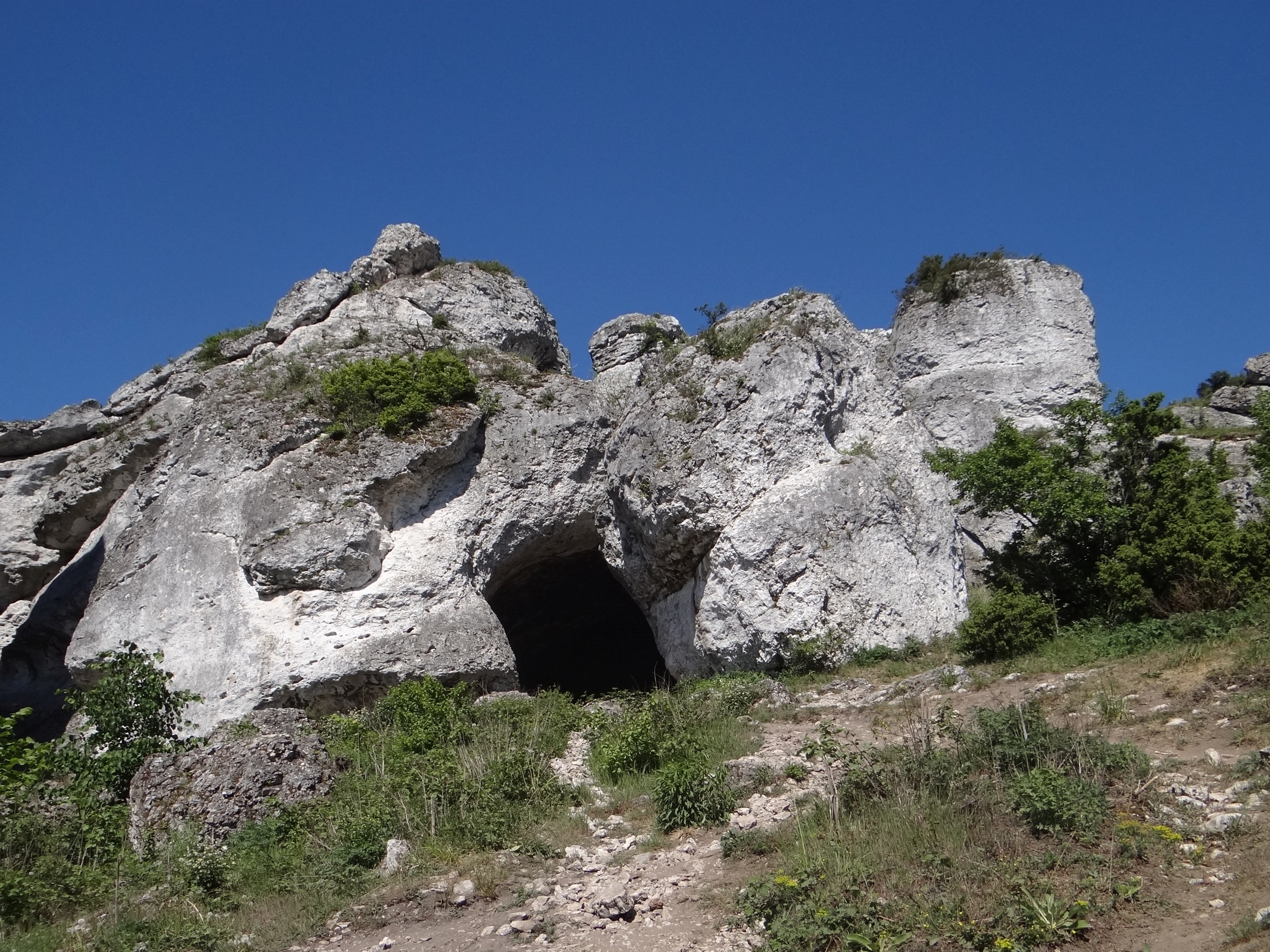 Formy skałkowe na Górze Zborów